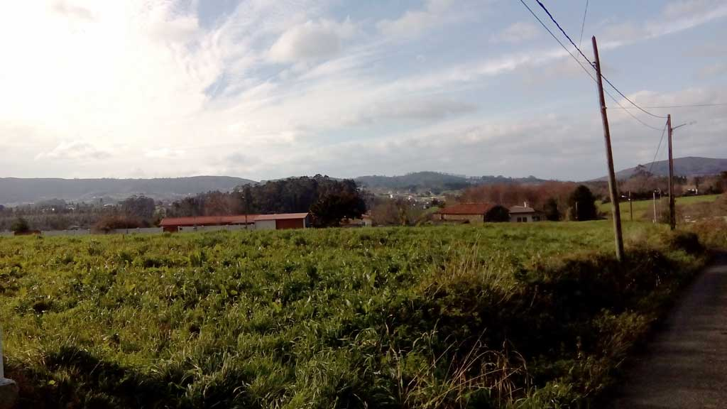 Vista da Chousa, Castro, Narón.